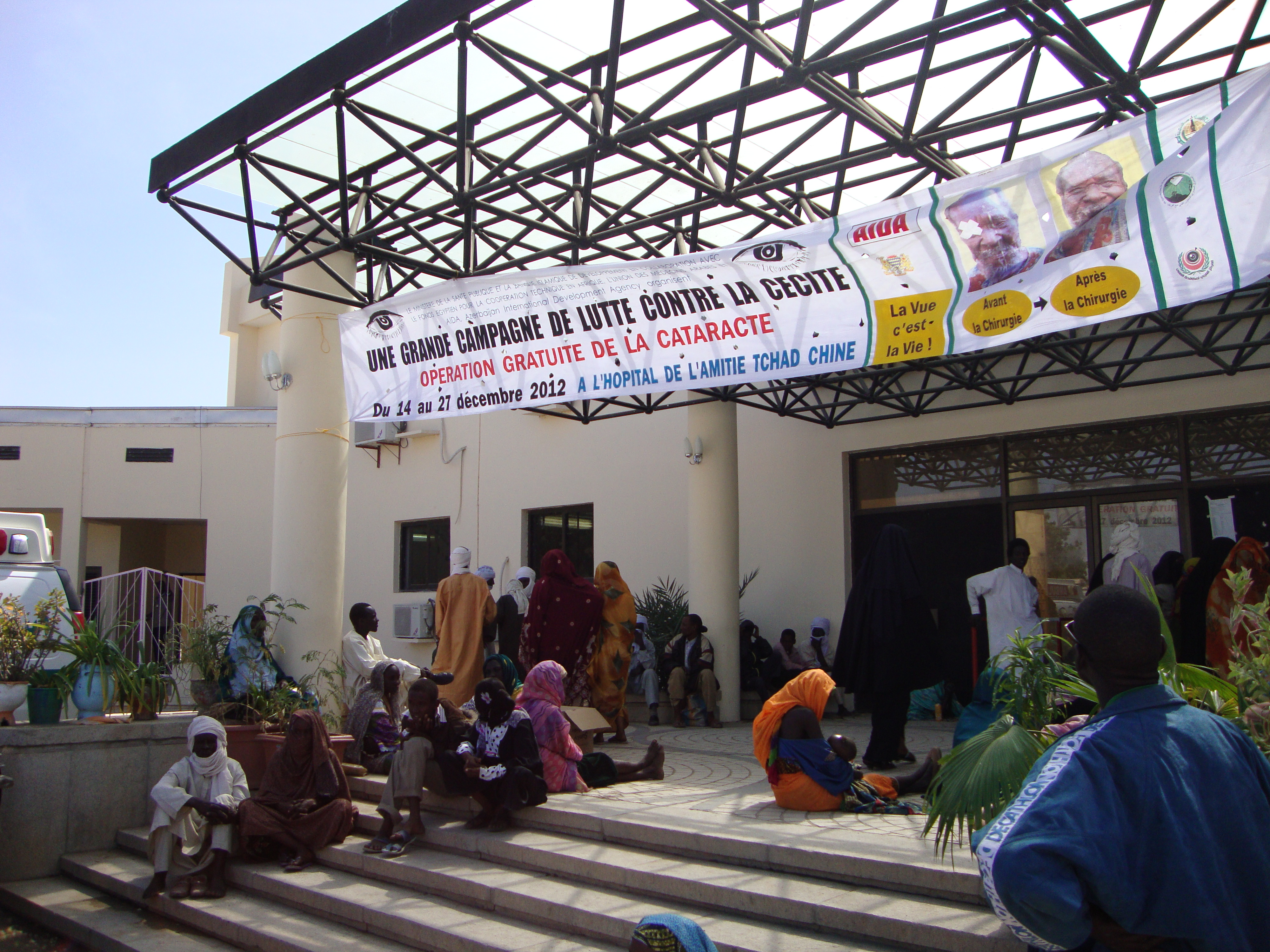 Qarşısı alına bilən görmə qabiliyyətinin itirilməsi ilə mübarizə” kampaniyası